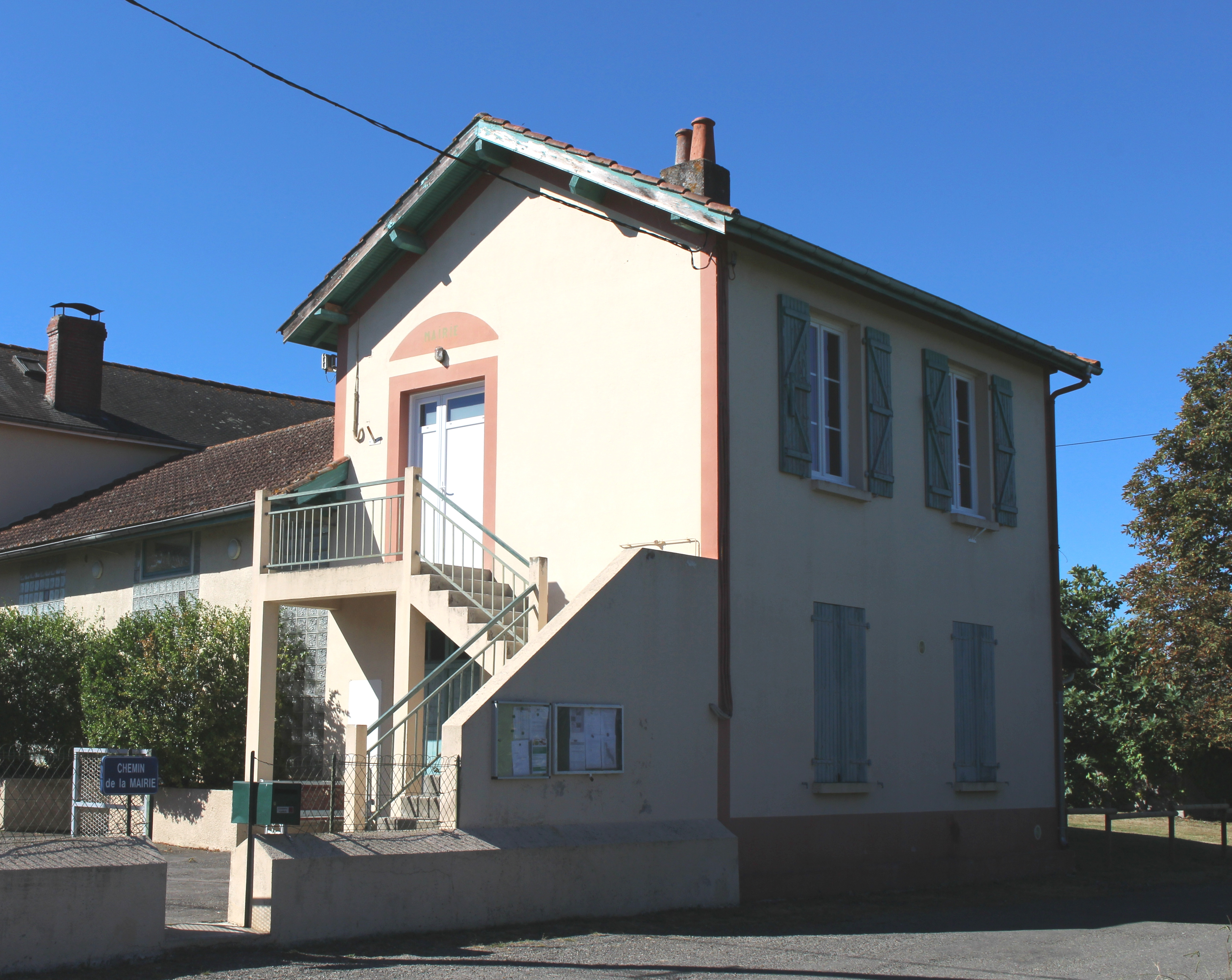 Mairie de Caussade-Rivière (Hautes-Pyrénées)